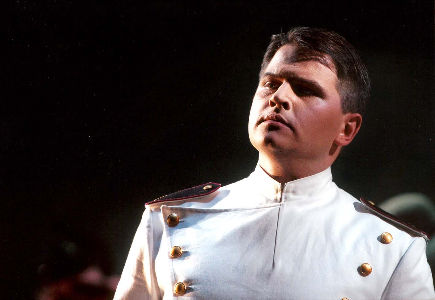 Blagoj Nacoski